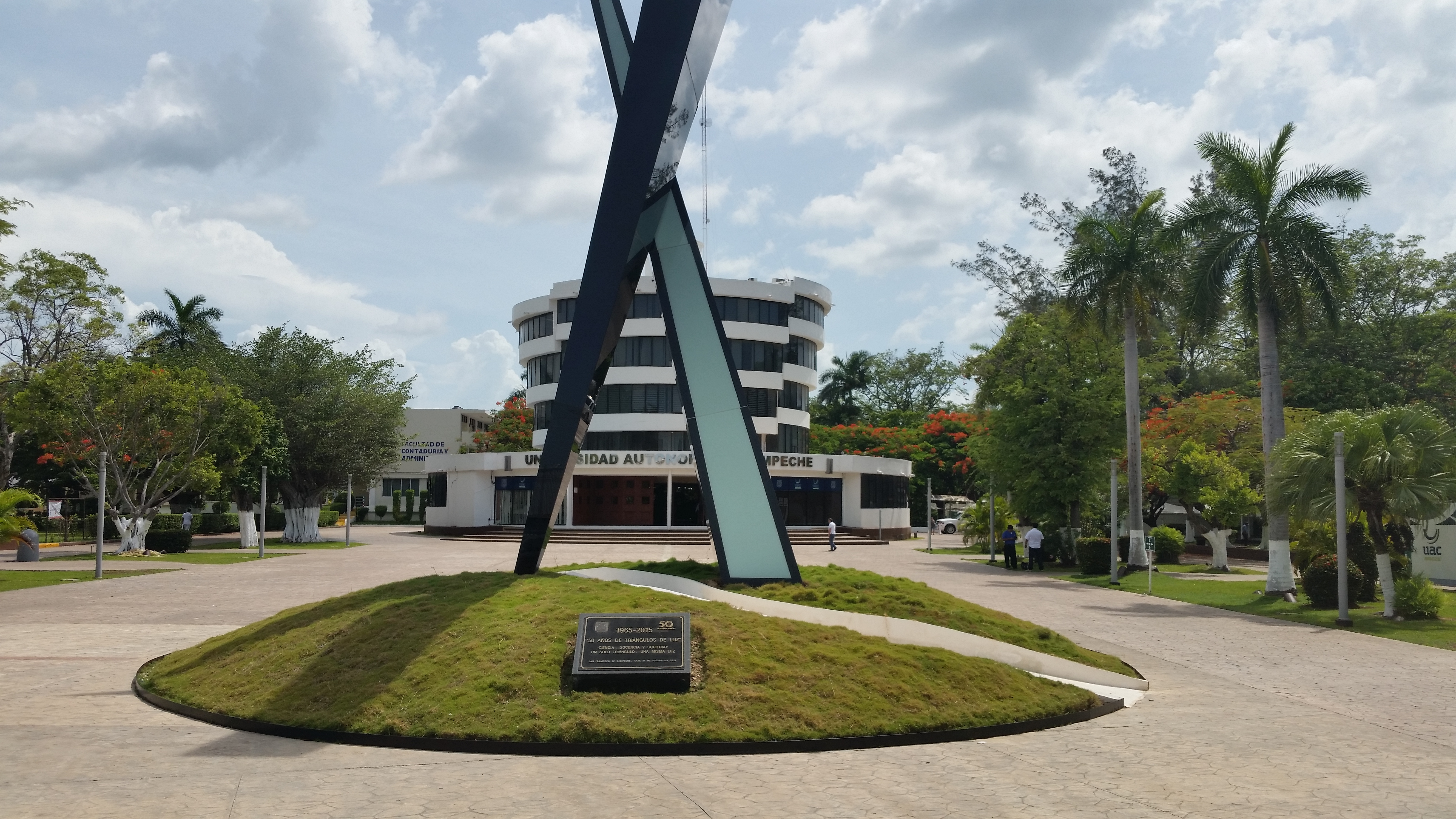 rectoria y monumento